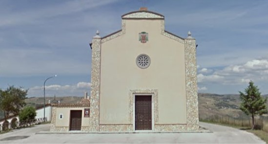 Santuario di San Michele, presso San Sossio Baronia